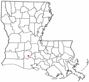 Volapük: Topam in tat: Louisiana.